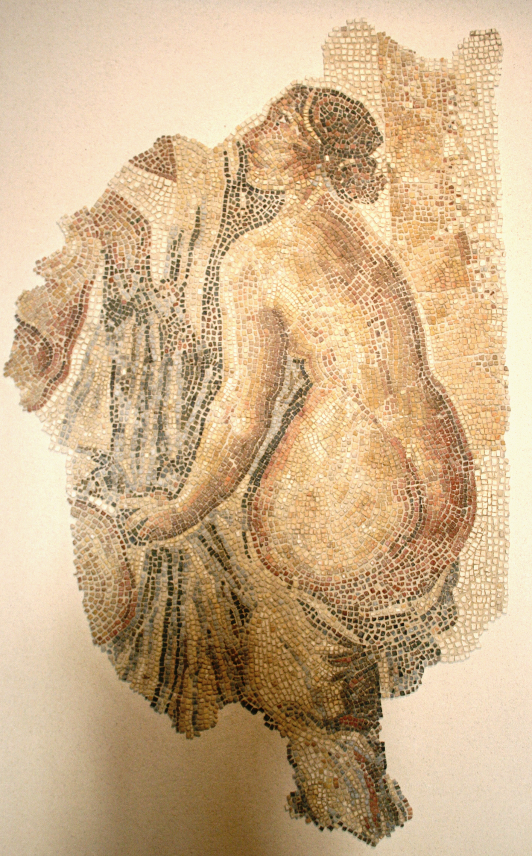 Mosaïque polychrome du IIIe siècle après J.C. découverte rue des Fabre à Marseille.